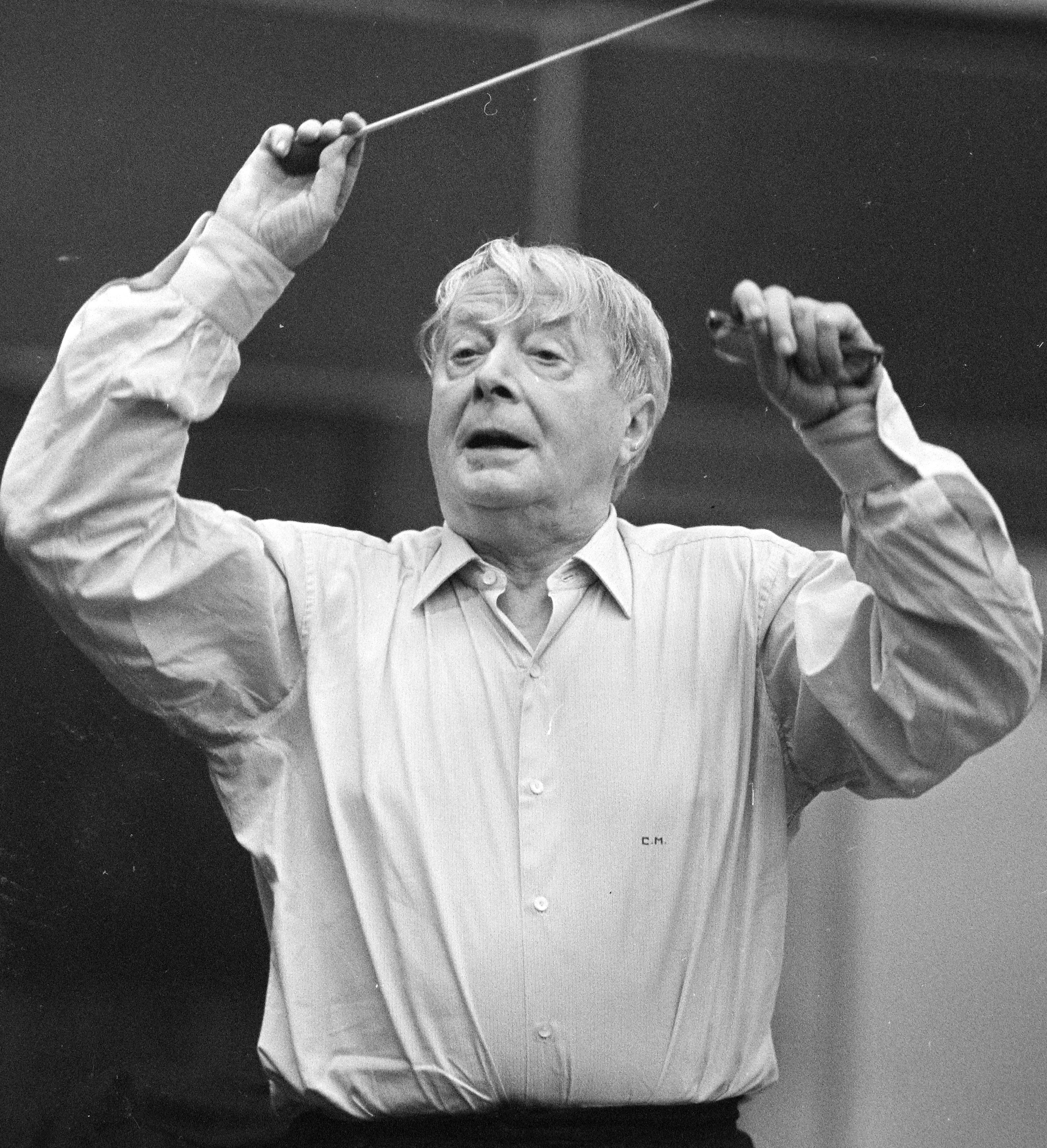 Charles Munch elzászi, német születésű karmester és hegedűművész. A francia zenekari repertoár mestere miatt a Bostoni Szimfonikus Zenekar zenei igazgatójaként ismert.